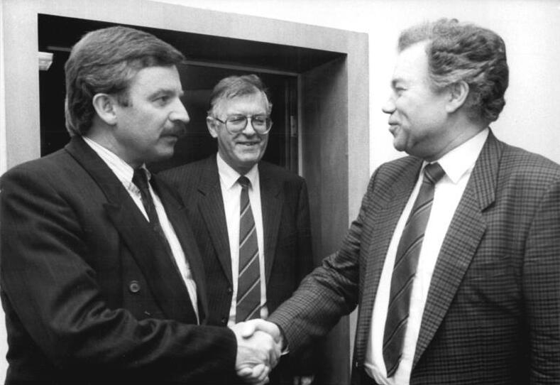 ADN-ZB Senft 11.1.90 Berlin: Möllemann-Besuch Der Minister der Jugend und Bildung, Prof. Dr. Hans-Heinz Emons (r), empfing den Bundesminister für Bildung und Wissenschaft; Jürgen Möllemann (l), zu einem Gespräch. Mitte: Dr. Franz Bertele, Leiter der Ständigen Vertretung der BRD in der DDR.